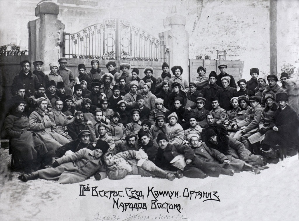 Sultangaliyev Doğu Halkları Komünist Örgütleri İkinci Tüm-Rusya Kongresi'nde. Aralık 1919, Moskova. Sultangaliyev ortalardaki beyaz kalpaklı.